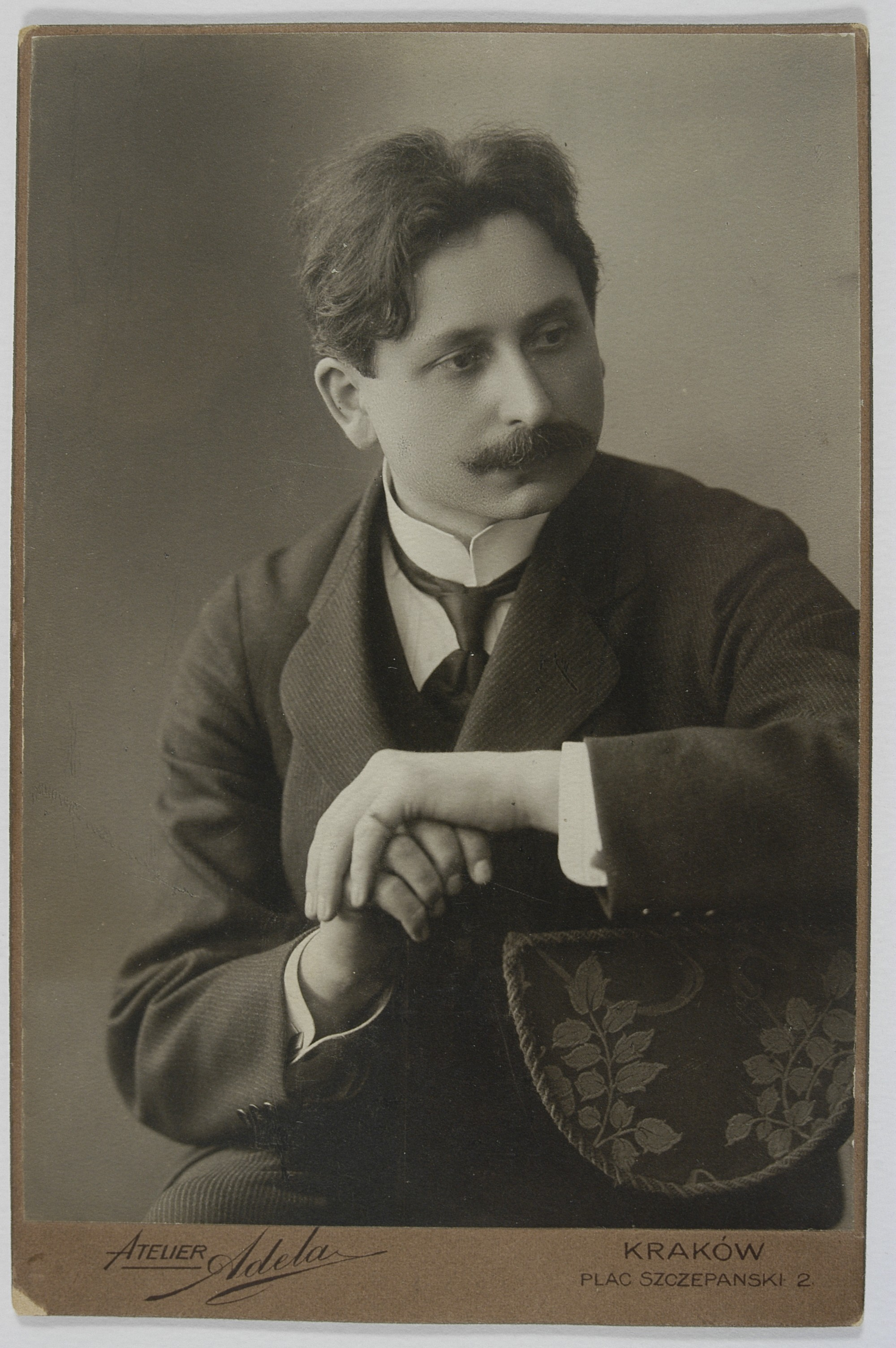 Feliks Nowowiejski, post 1908 r.